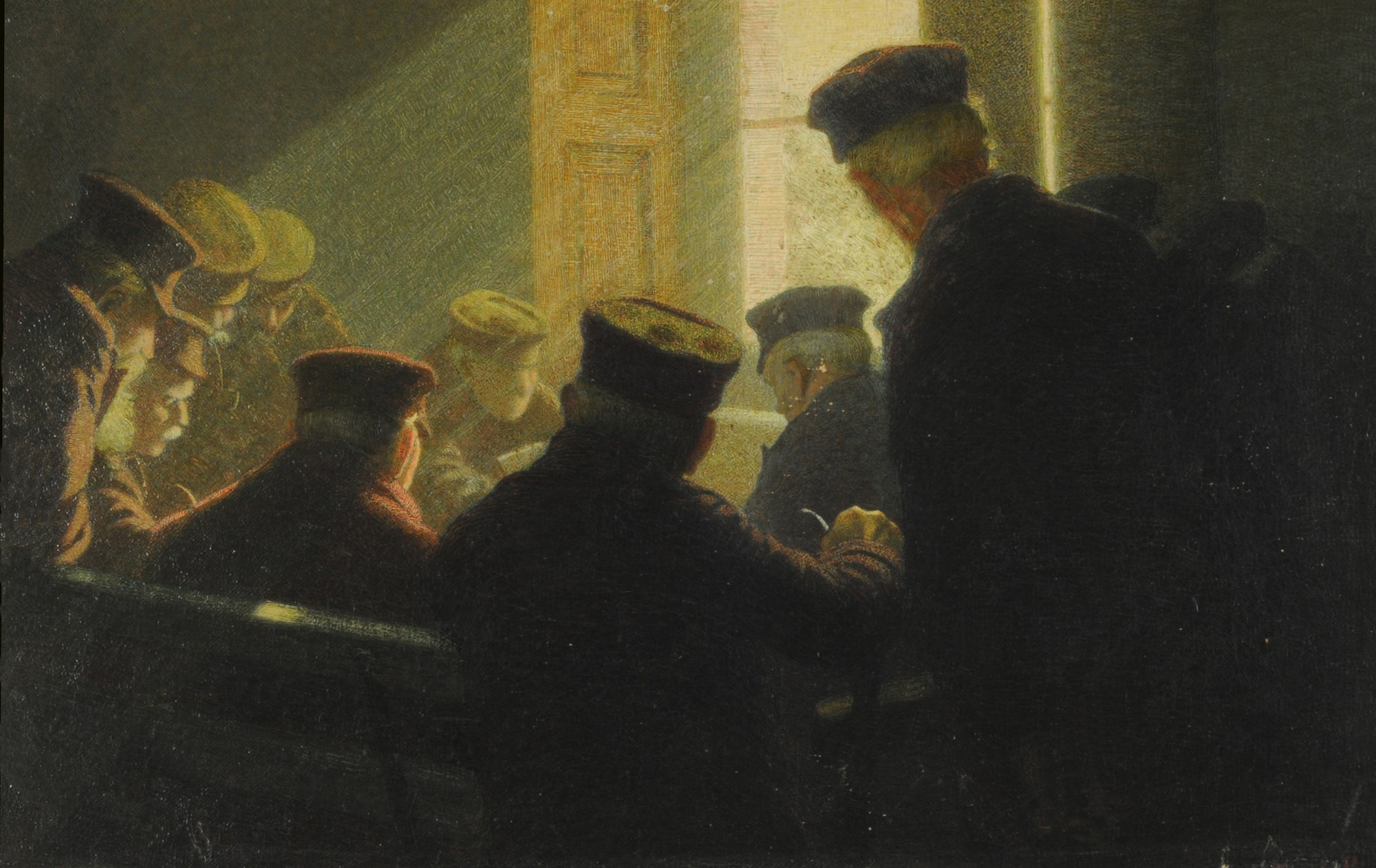 Una partita interessante (Una partida interesante).